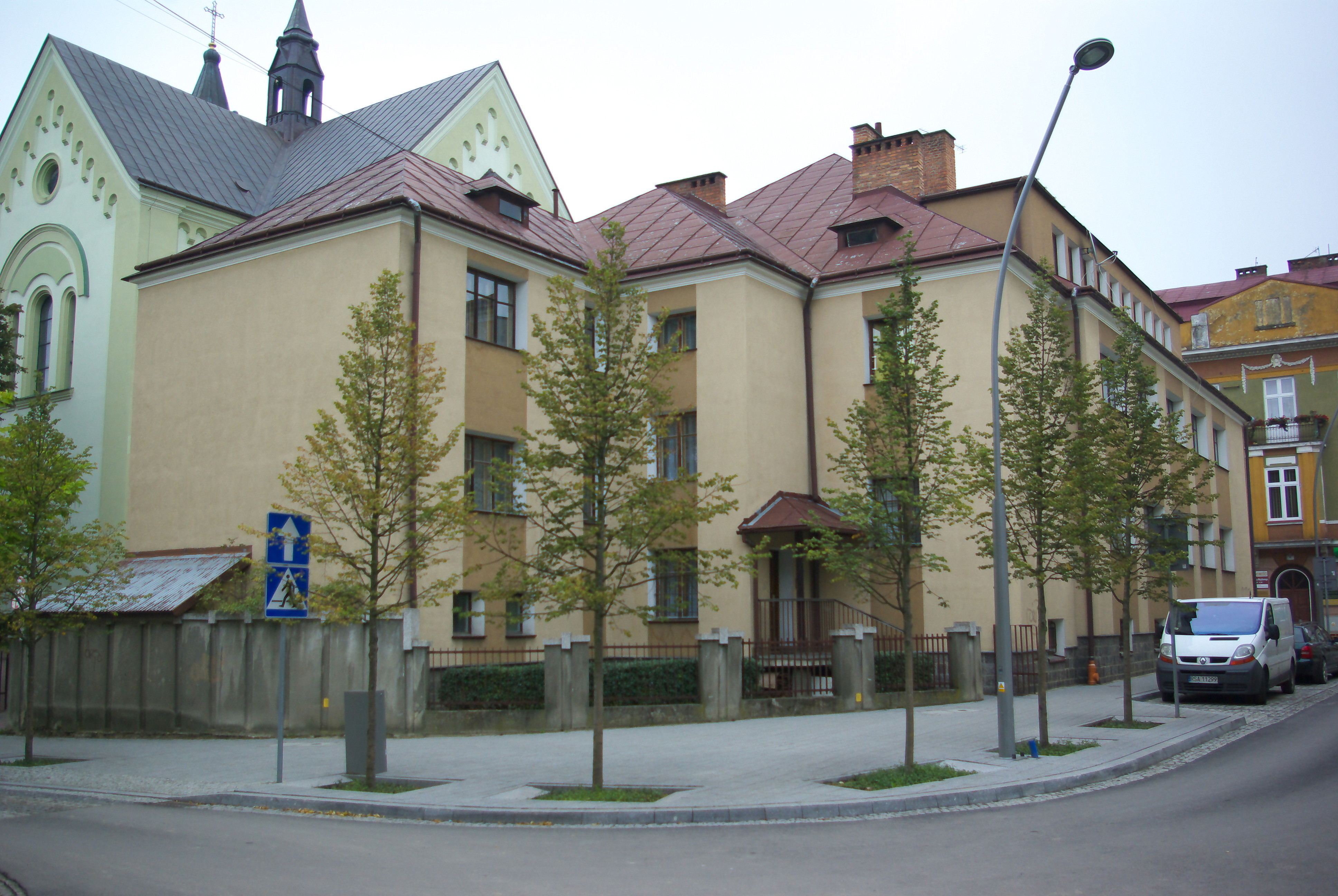 Plebania kościoła Przemienienia Pańskiego w Sanoku.